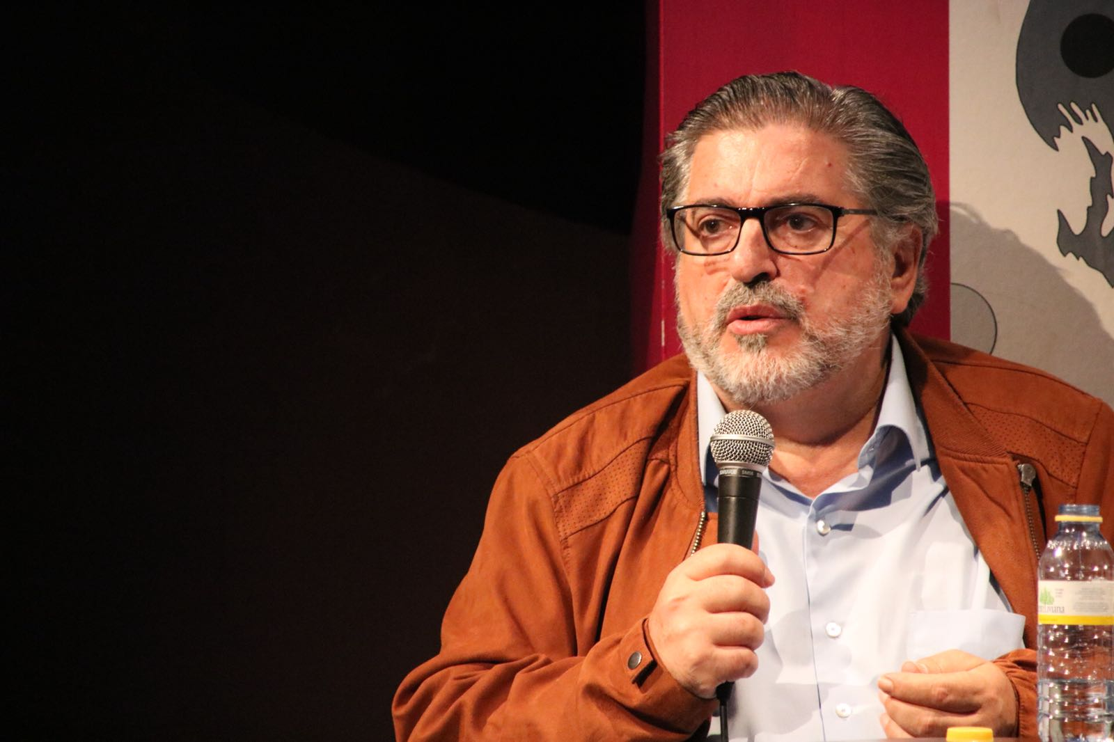 El secretario general del PSOE de Extremadura, Guillermo Fernández Vara, ha participado en el Centro de Ocio Contemporáneo (COC) de Badajoz para hablar sobre “El Fin de ETA”, junto al exsecretario general del PSOE, Alfredo Pérez Rubalcaba, y el expresidente del PSE, Jesús Eguiguren